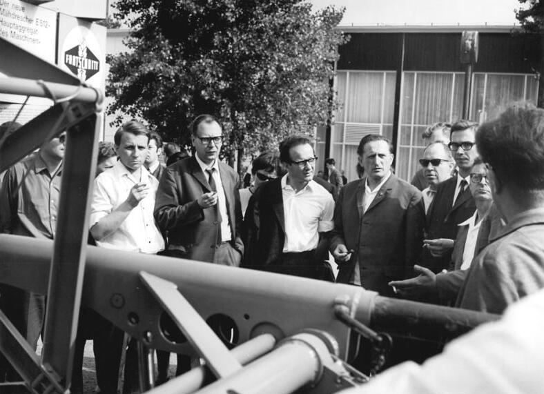 Zentralbild Kluge 5.7.68 Leipzig: Schriftsteller auf der "agra" Eine Gruppe von Schriftstellern und Studenten des Literaturinstituts "Johannes R. Becher" in Leipzig besuchte am 4.7.68 die "agra 68". Unser Foto zeigt v.l.n.r. Werner Bräunig, Dr. Jochen Schäfers, Sekretär des Deutschen Schriftstellerverbandes, Werner Haiduczek und Werner Reinowski. Diese Besichtigung der Landwirtschaftsausstellung, der scih Aussprachen mit Landwirtschaftsexperten anschließen, setzt das in Neuholland begonnene Gespräch über Probleme der modernen Landwirtschaft fort.